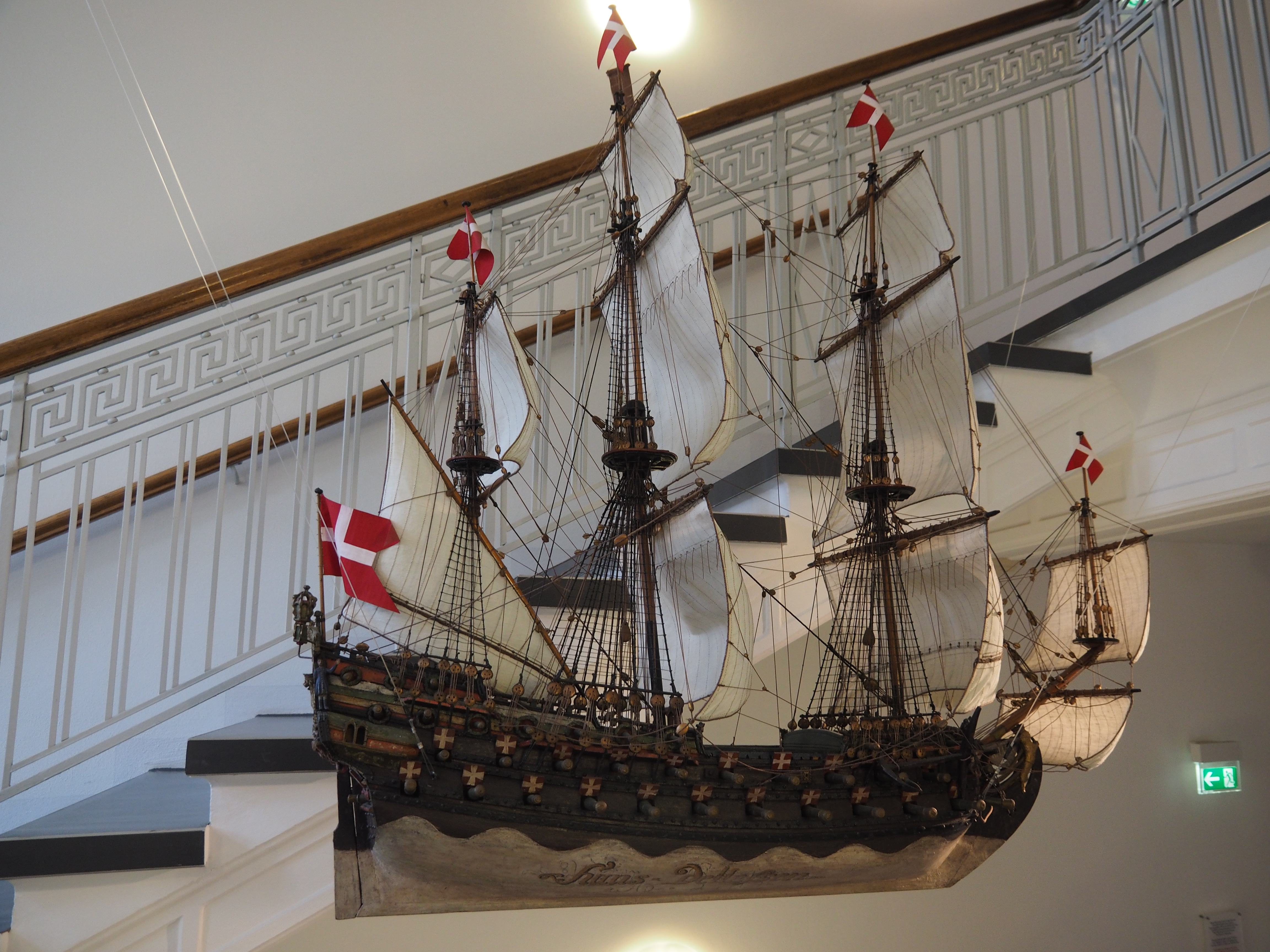 Votivschiff "Urania" (um 1690) im Schifffahrtsmuseum Flensburg. Modell des dänischen Orlogschiff Norske Løve, ursprünglich in der Kirche in Großsolt